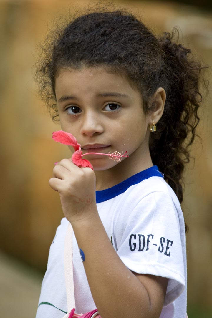 Brazilian girl